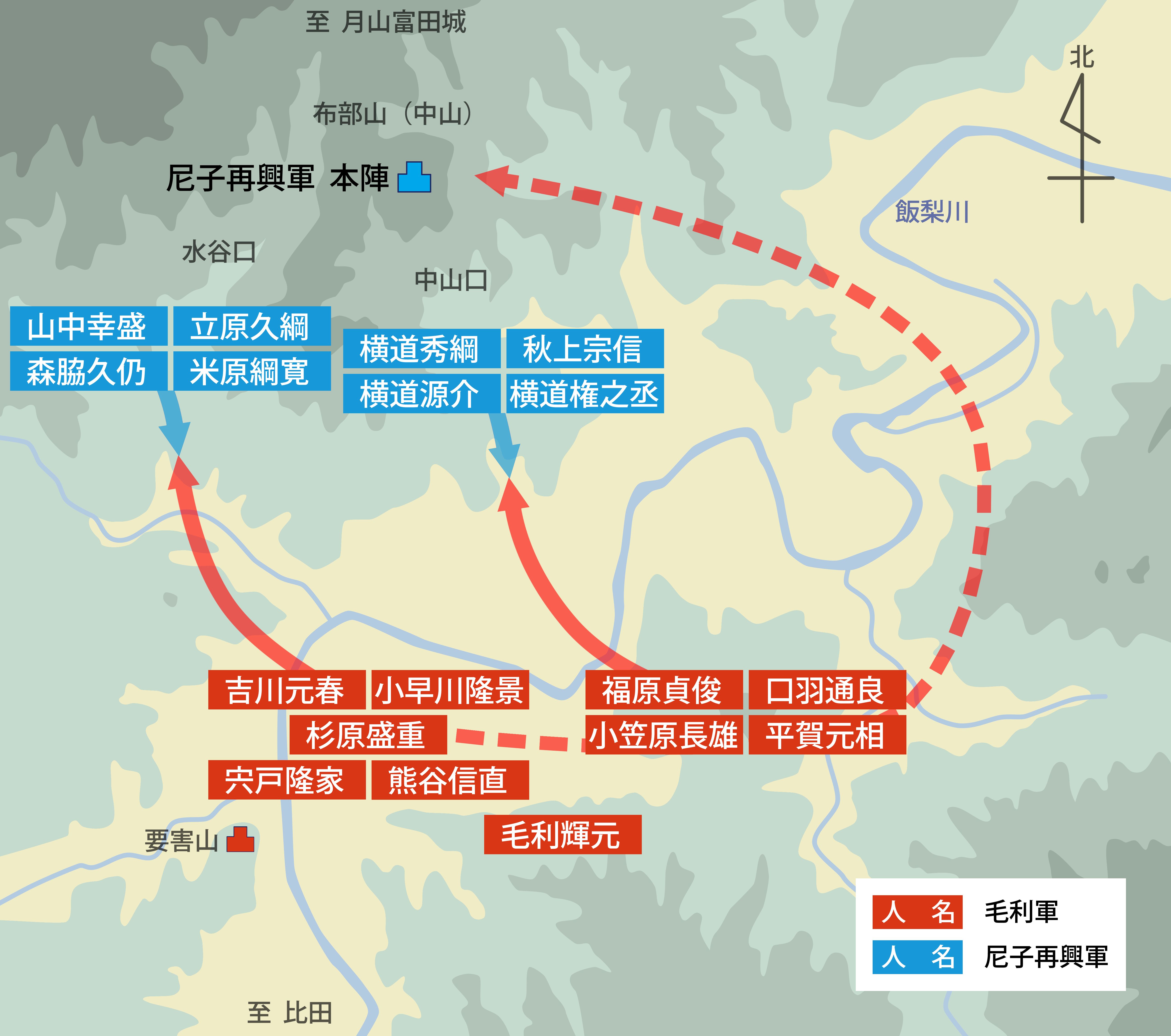 布部山の戦いの合戦図。